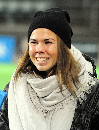 Jessica Samuelsson